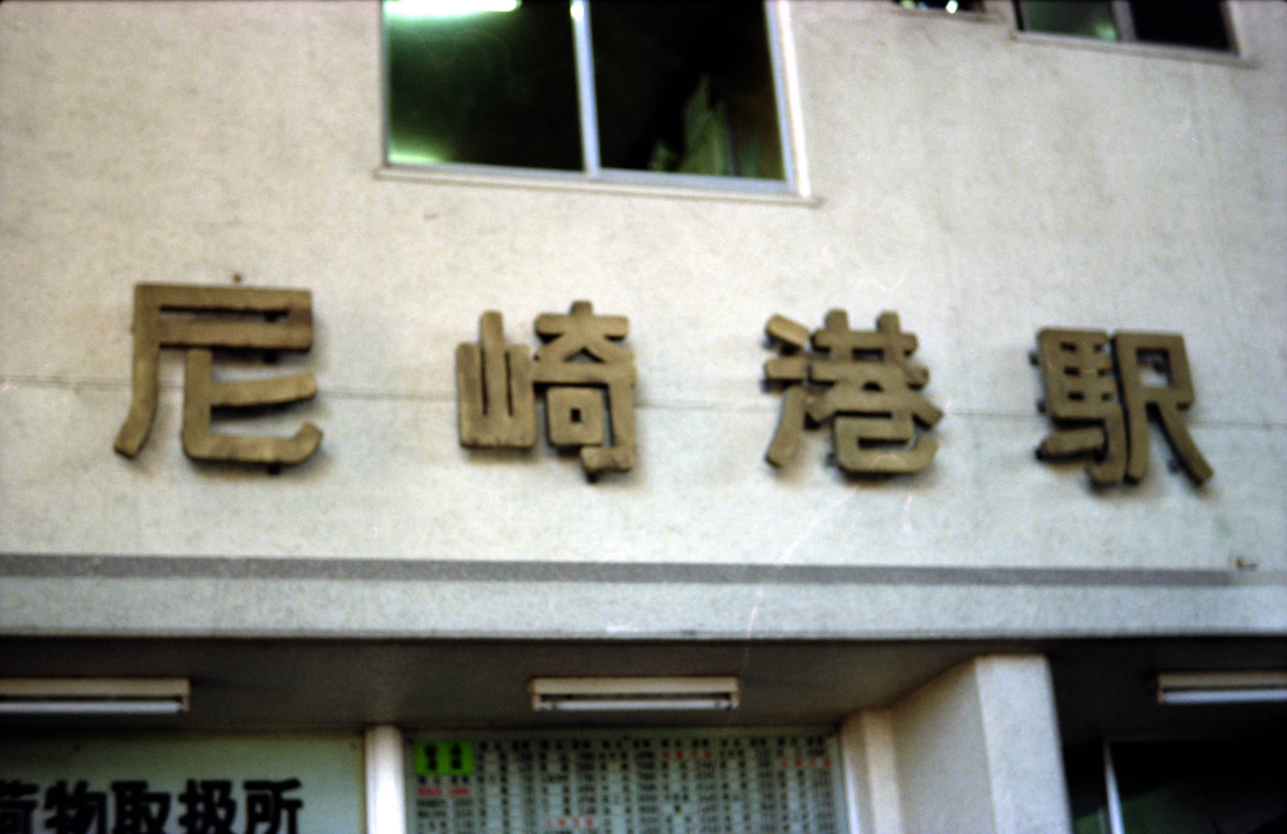 JNR Fukuchiyama-Line Amagasaki-kou sta